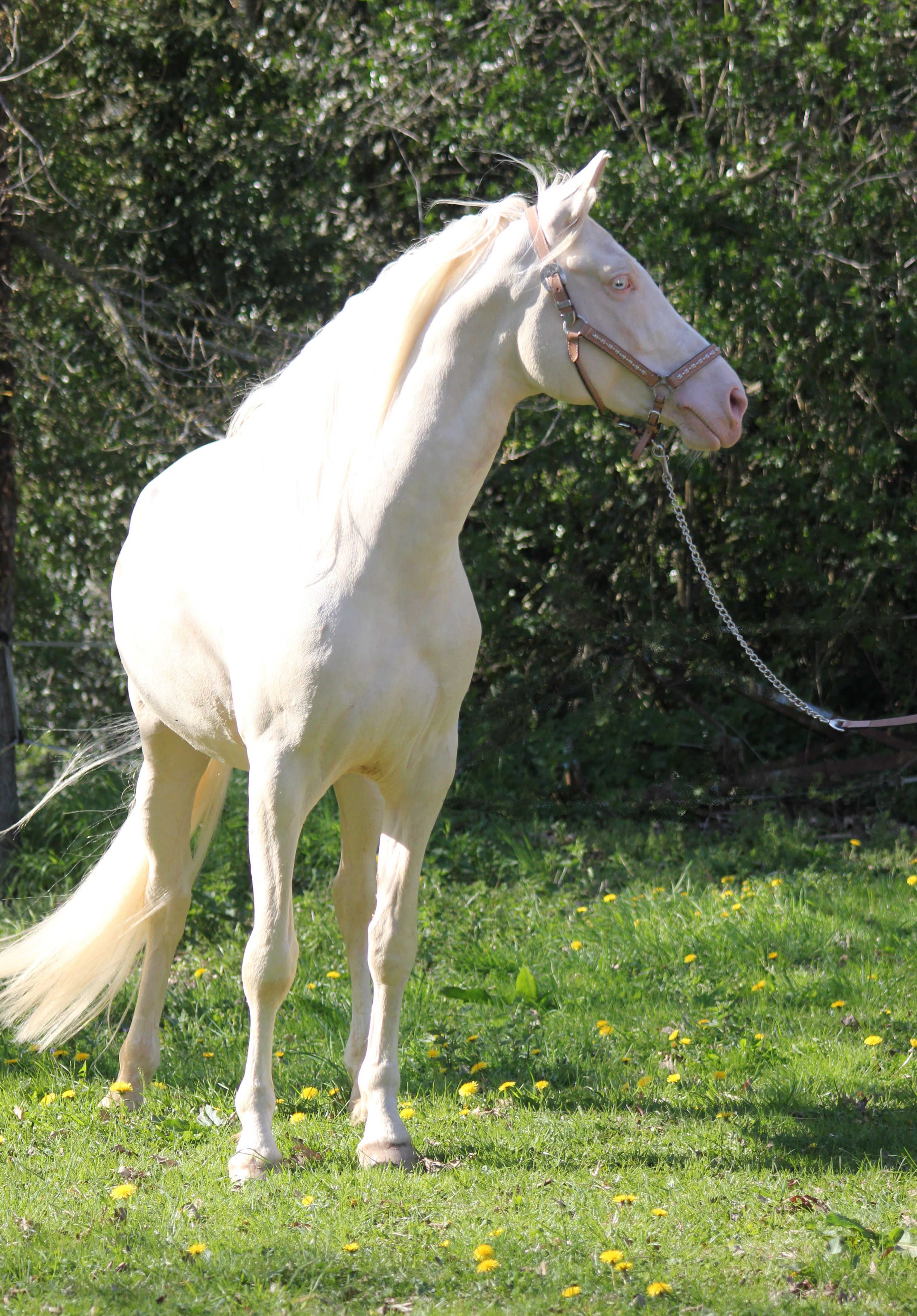 Peau rose, yeux bleux, poil blanc creme, crin blancs ou creme.